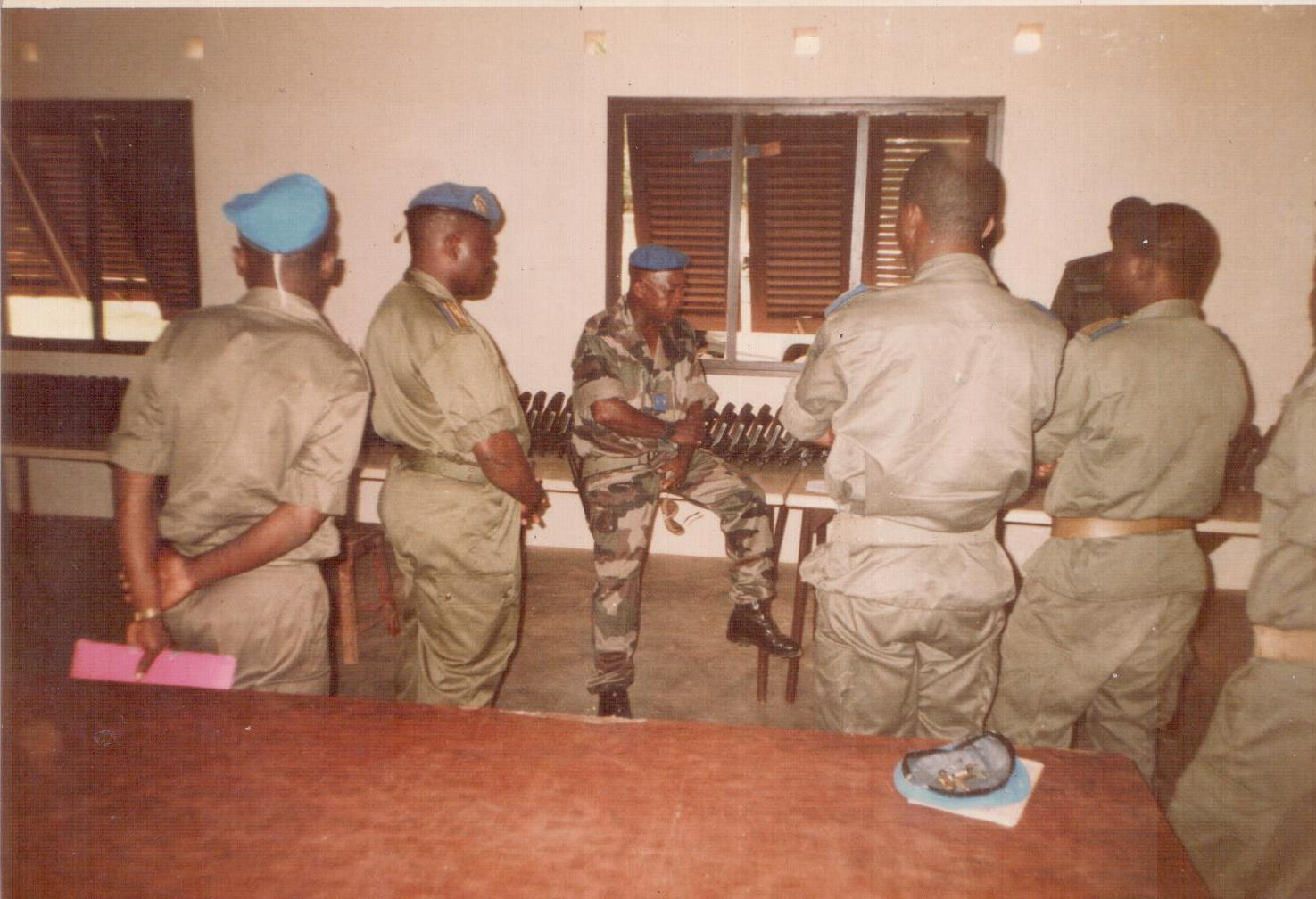 Instruction lors de la manœuvre